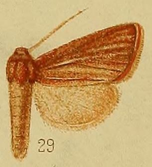 Timora daphoena